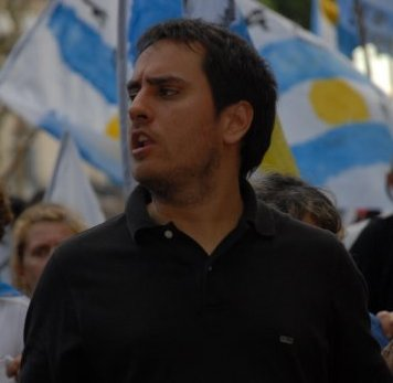 El legislador por la Ciudad de Buenos Aires Juan Cabandié en una marcha.